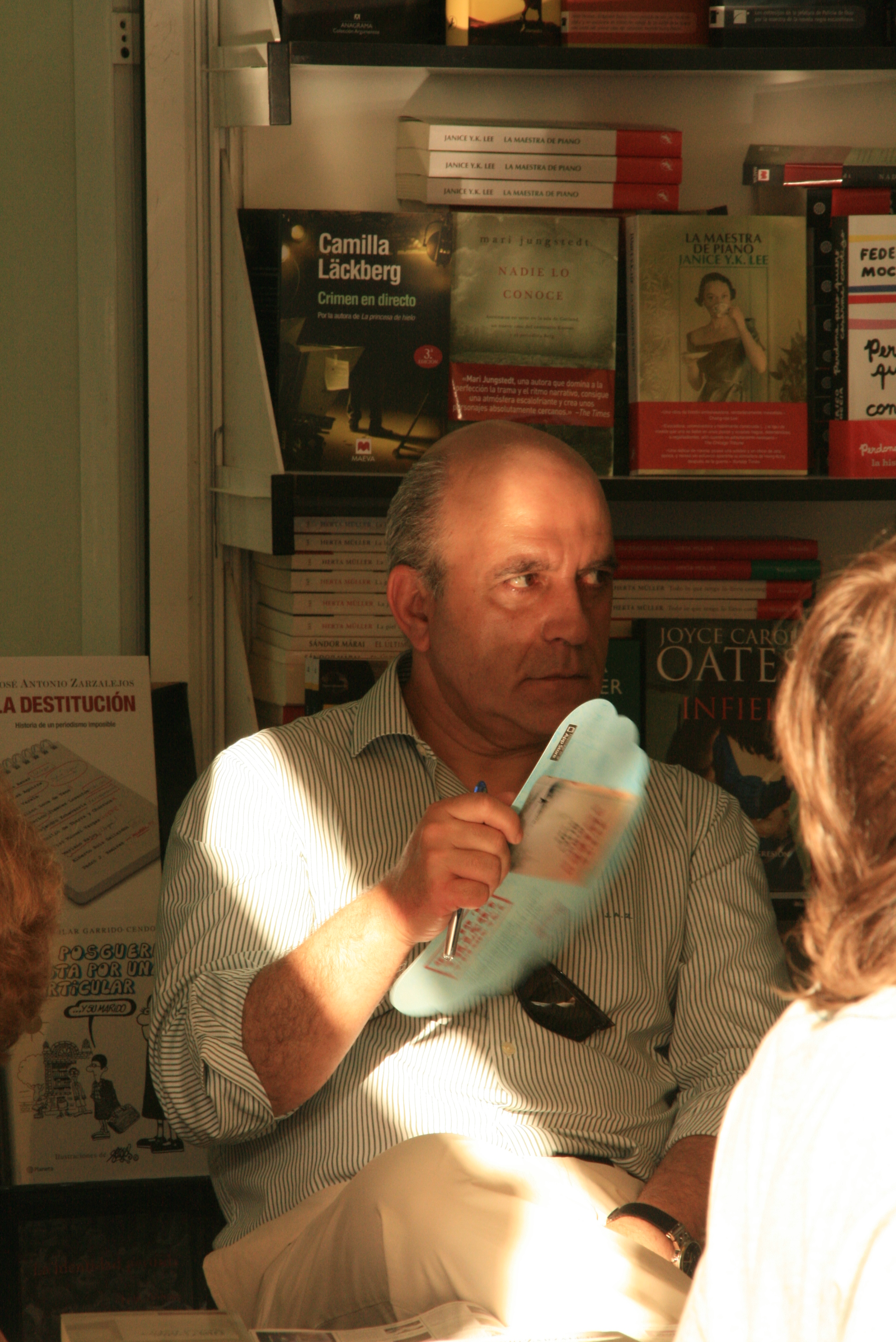 José Antonio Zarzalejos firmando en la Feria del Libro de Madrid en el parque del Retiro